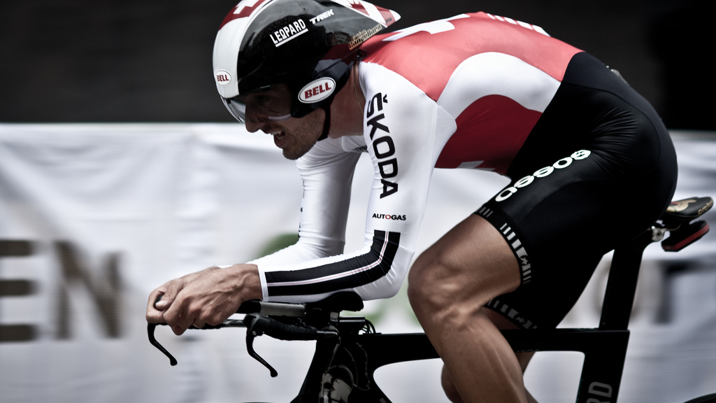 Le coureur cycliste Fabian Cancellara en 2011.